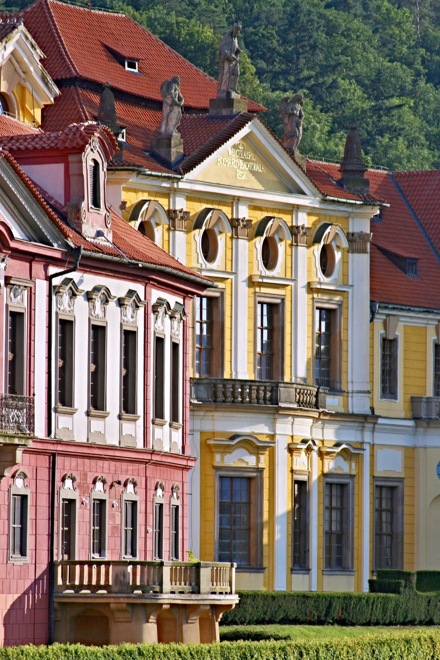 Zbraslavský klášter-zámek